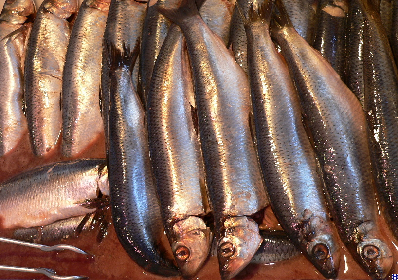 Matjes, frisch aus dem Fass, Hamburg